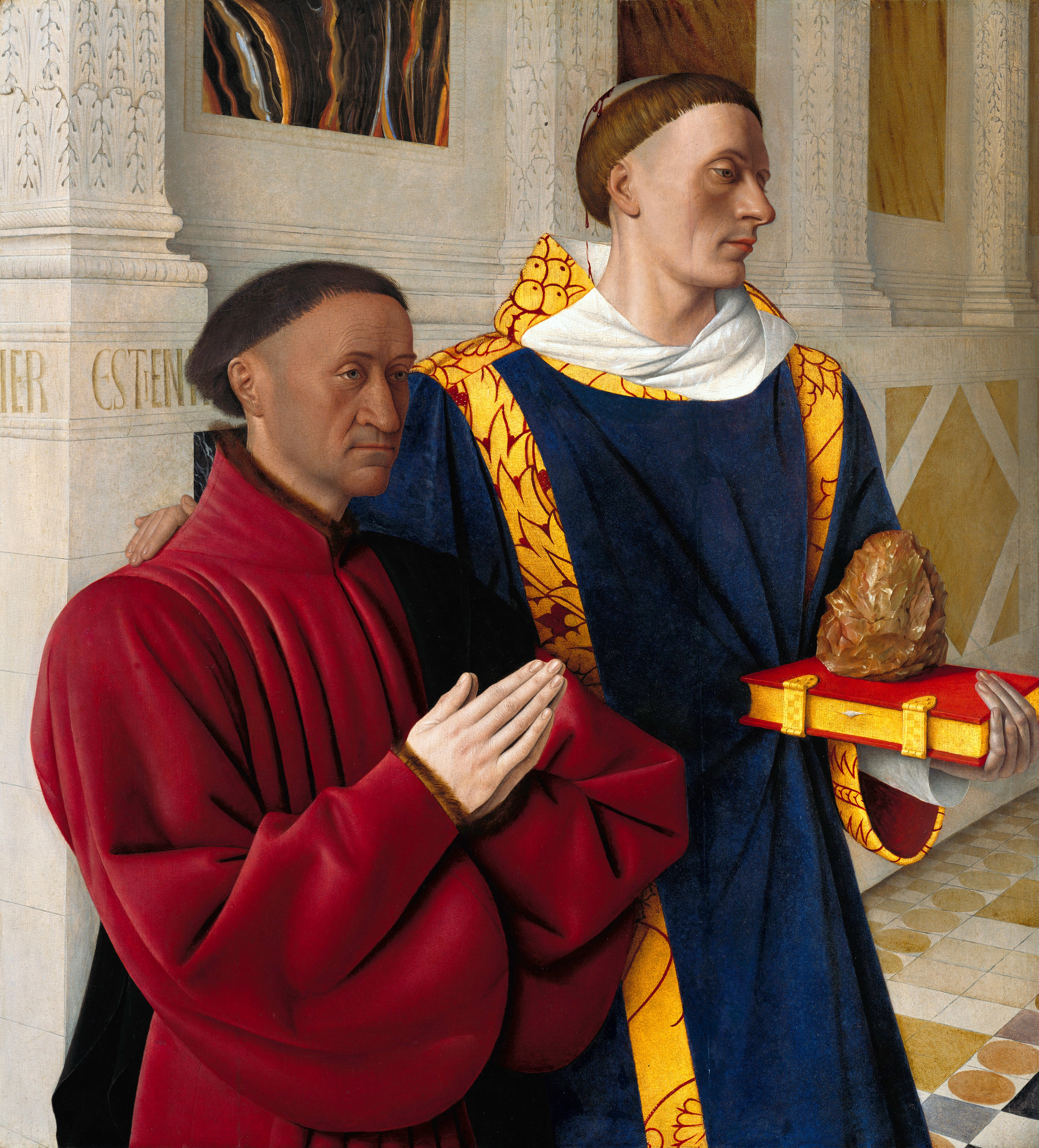 Étienne Chevalier (gest. 1474)